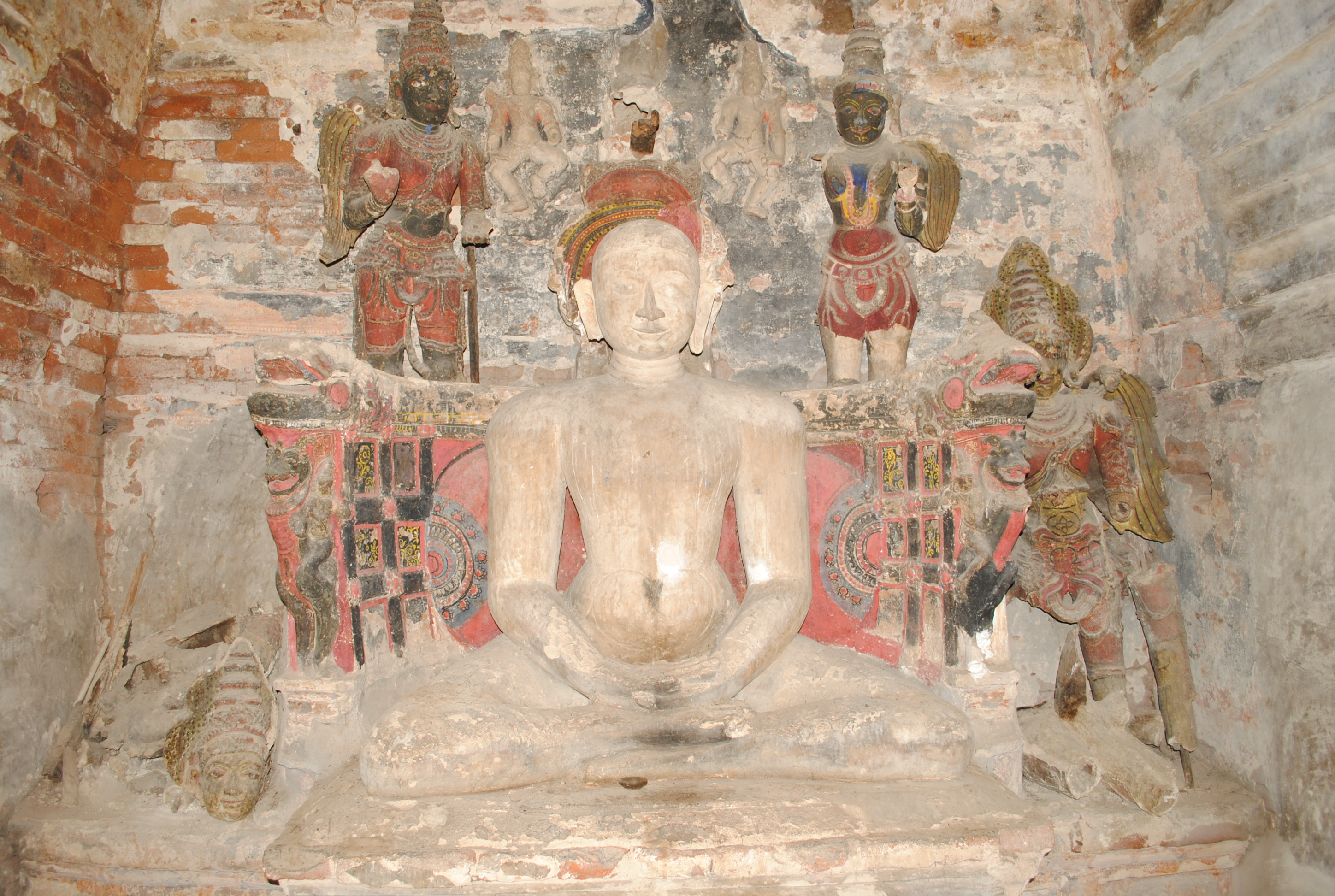 Tirumalai Jain temple